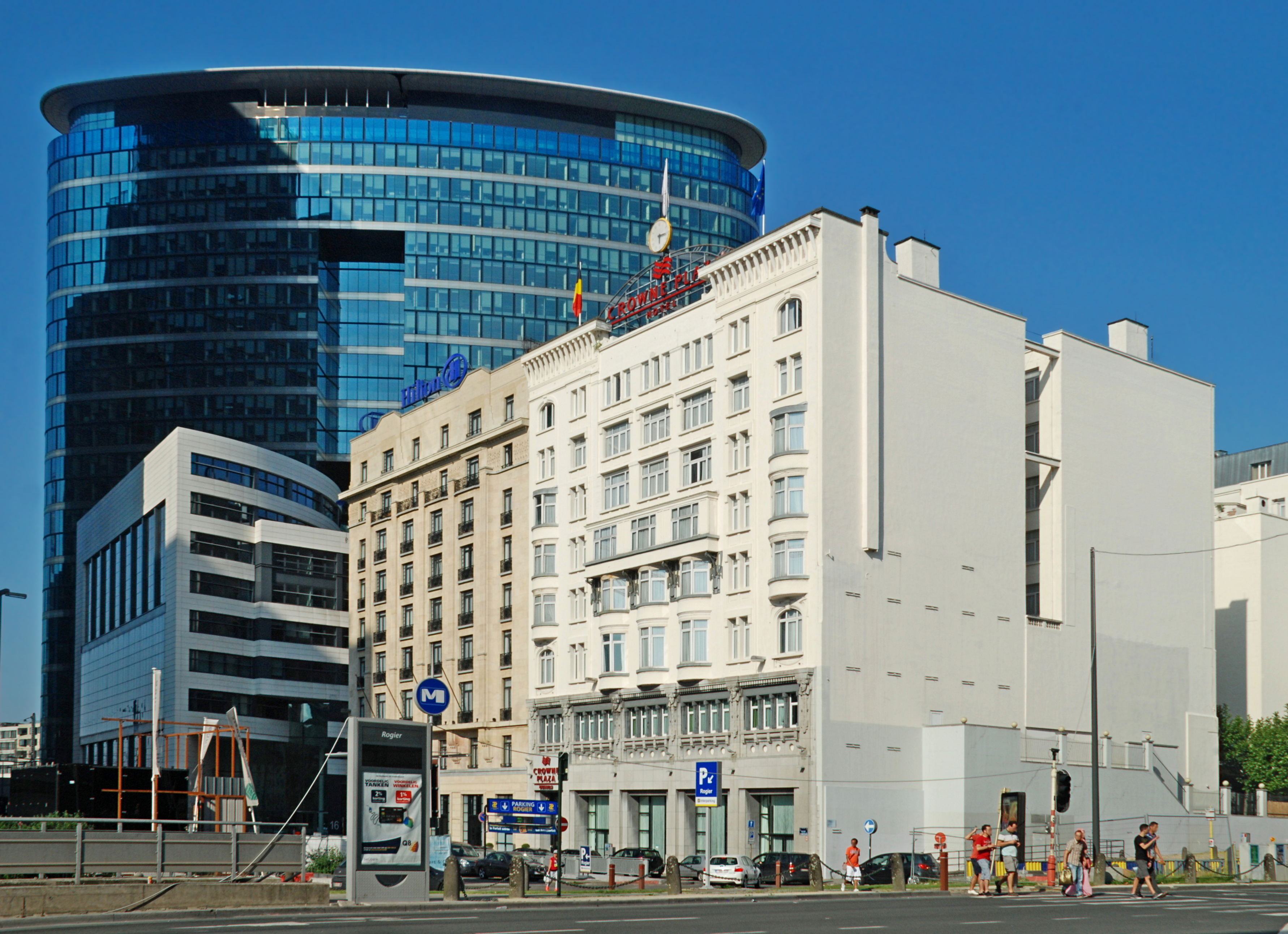 Belgique - Bruxelles - Palace Hôtel (Art nouveau, Adhémar Lener / Antoine Pompe, 1909 ; actuellement Crowne Plaza Hotel)